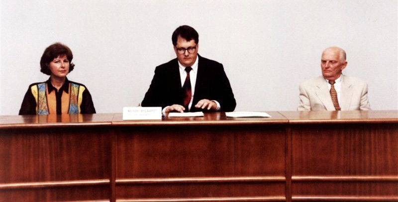 Nilson Bylaardt, presidente da câmara de vereadores de Guaramirim